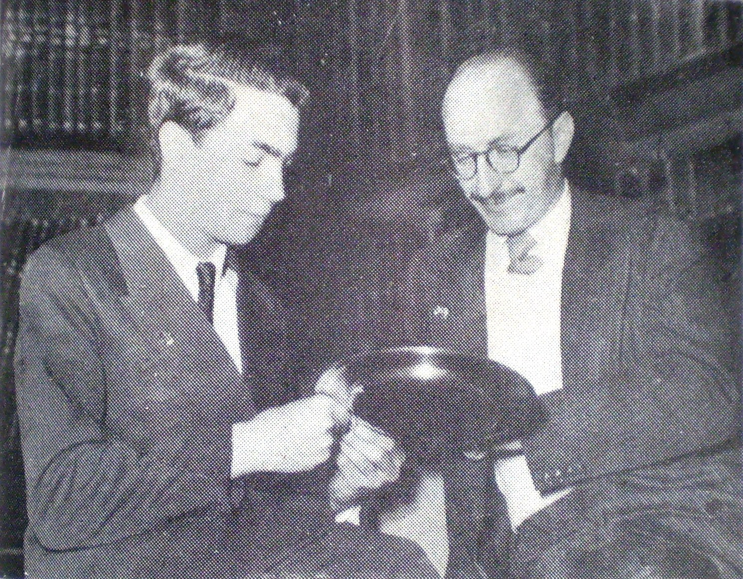 Oscar Panno (izquierda) y Julio Bolbochán en el Club Argentino